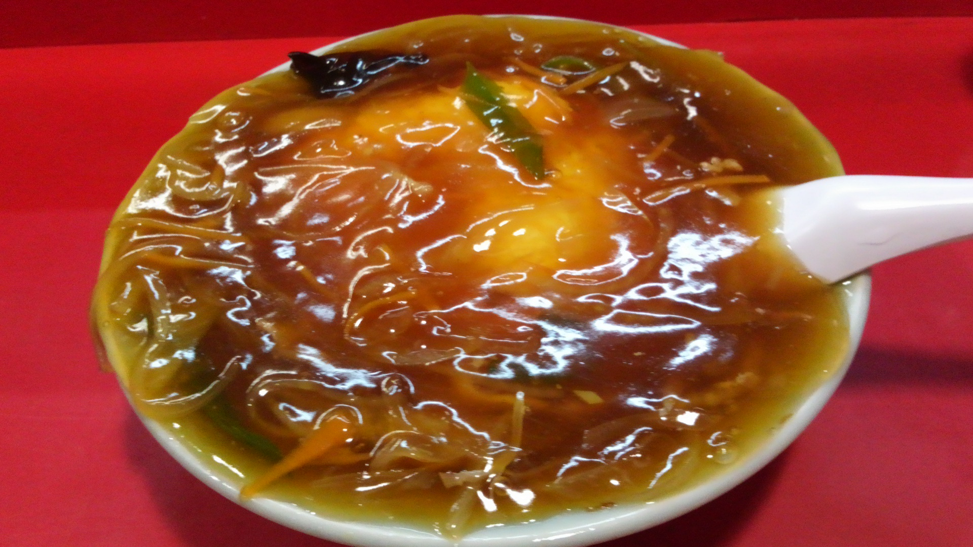 広島市，「サンモール」内「蓬莱」の天津飯。